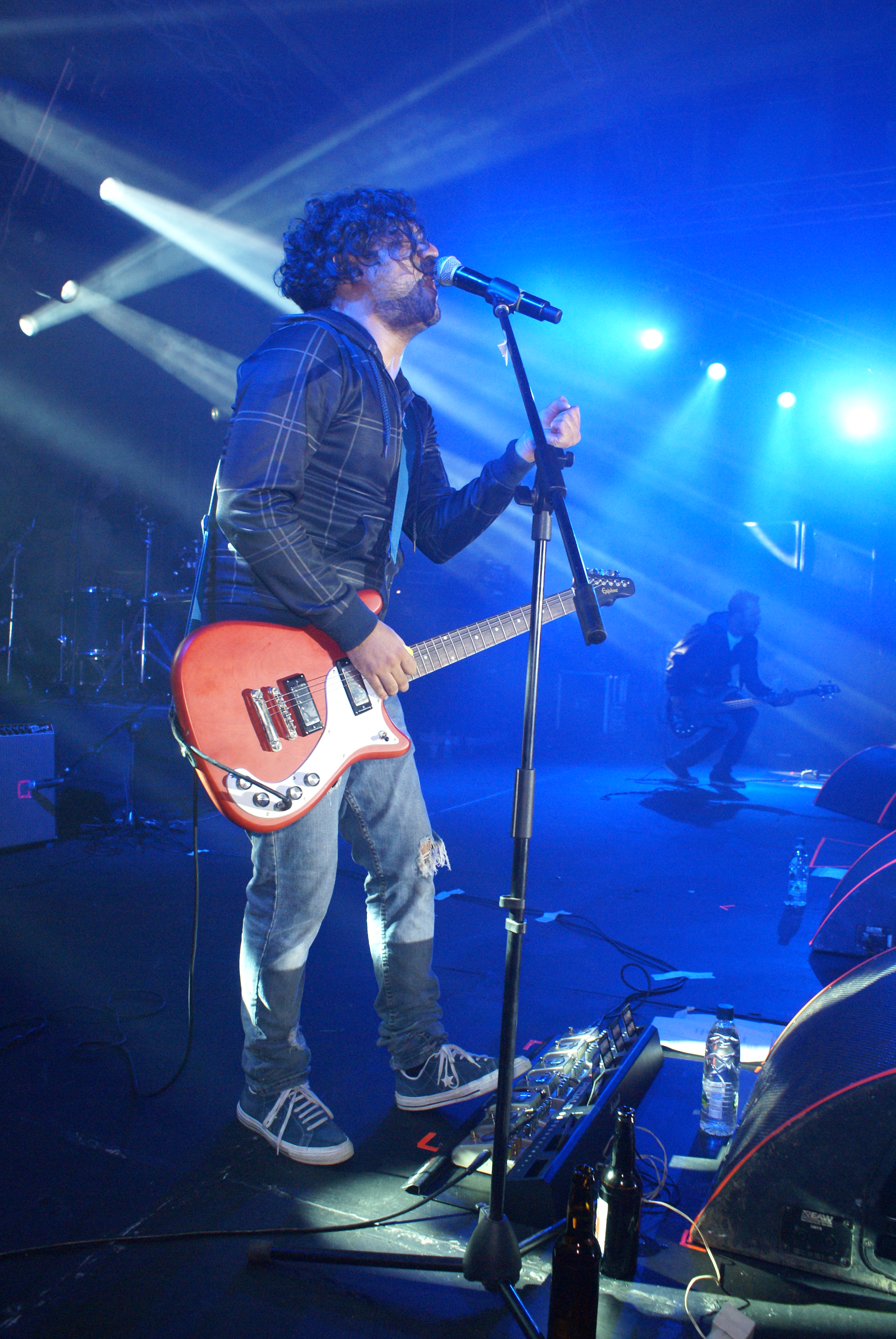 Levítico abriendo para Zapato 3 en La Última Cruzada (julio 2012)